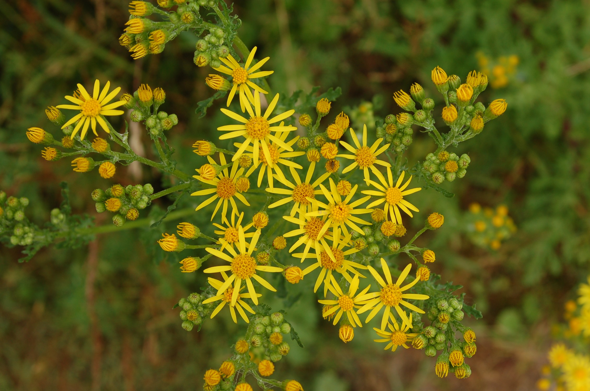 Blütenstand eines Sumpf-Kreuzkrauts, Kreuzkraut Greiskraut wegen der "weißhaarigen" Flugsamenbüschel